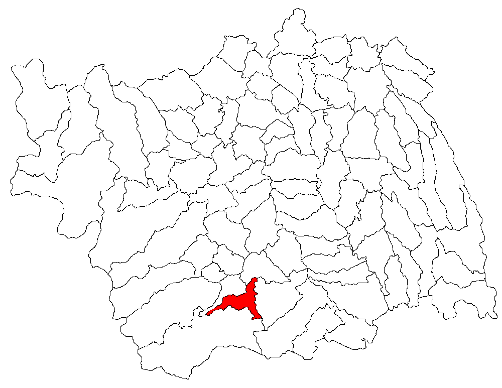 Categorie:Hărţi ale judeţului Bacău